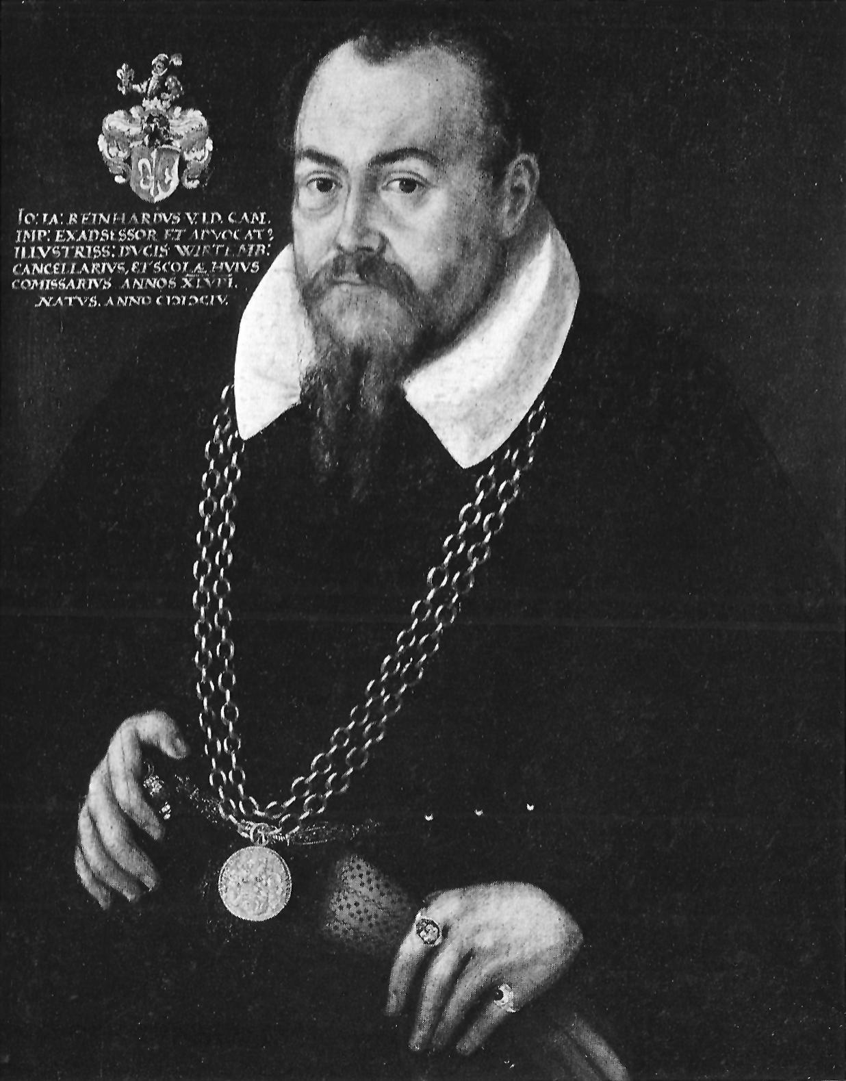 Prof. Johann Jacob Reinhard (Ölbildnis in der Tübinger Professorengalerie)